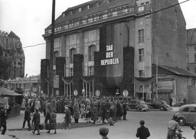 Berlin, Friedrichstraße, Metropol Theater, Staatsoper Illus Quaschinsky 7.10.50 Verleihung der Nationalpreise 1950. Am 7.10.50, dem Tag der Republik, wurden in der Deutschen Staatsoper in Berlin Friedrichstrsse, die Nationalpreise 1950 an verdiente Künstler, Wissenschaftler, Techniker und Aktivisten verliehen. UBz: Die Staatsoper von außen im Festschmuck.